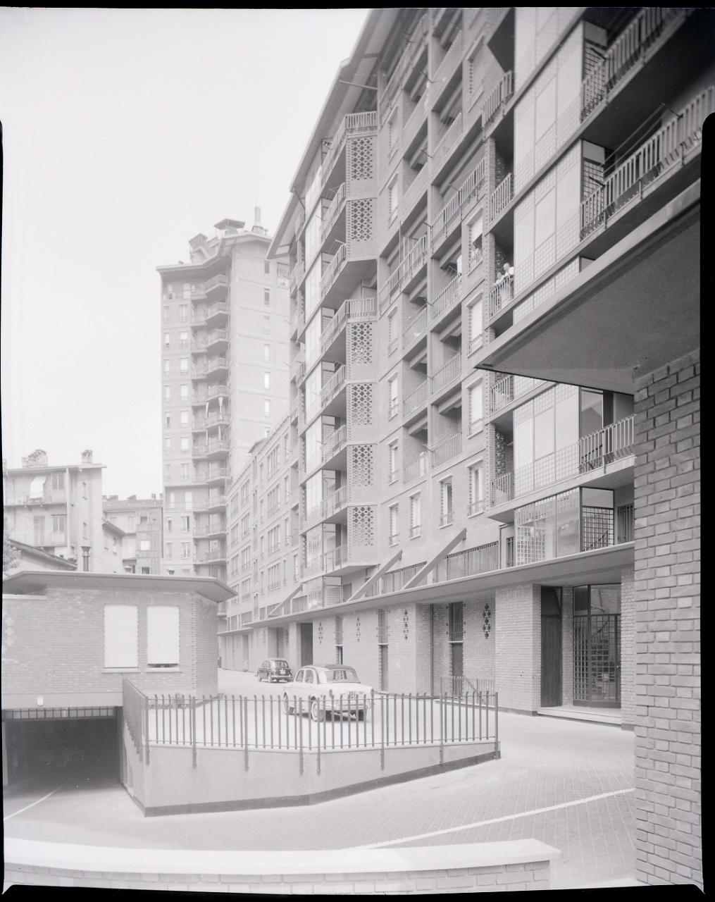 Servizio fotografico : Torino, 1970 / Paolo Monti. - Buste: 19, Fototipi: 21 : Negativo b/n, gelatina bromuro d'argento/ pellicola ; 10x12. - ((Serie costituita da 21 negativi identificati con i nn.: 2776-2778, 2780-2781, 27832785, 2788, 2791-2792, 2797, 2790, 2794, 2799, 2801, 2805-2806, 2809-2810. Altra numerazione parallela: 1092-1094, 1096-1097, 1099-1100, 1103, 1105-1107, 1109, 1112, 1114, 1116, 1119, 1121-1122. La suddetta serie è contenuta nella scatola identificata con la numerazione G2721/2868; sul coperchio iscrizione manoscritta a pennarello: "2/ BBPR/ studio archit.7 1123-". - Fonte: Rubrica di Paolo Monti: Archivio 10x12 (ultimi numerati) - dal G1 al (s.d.), presso Archivio Paolo Monti